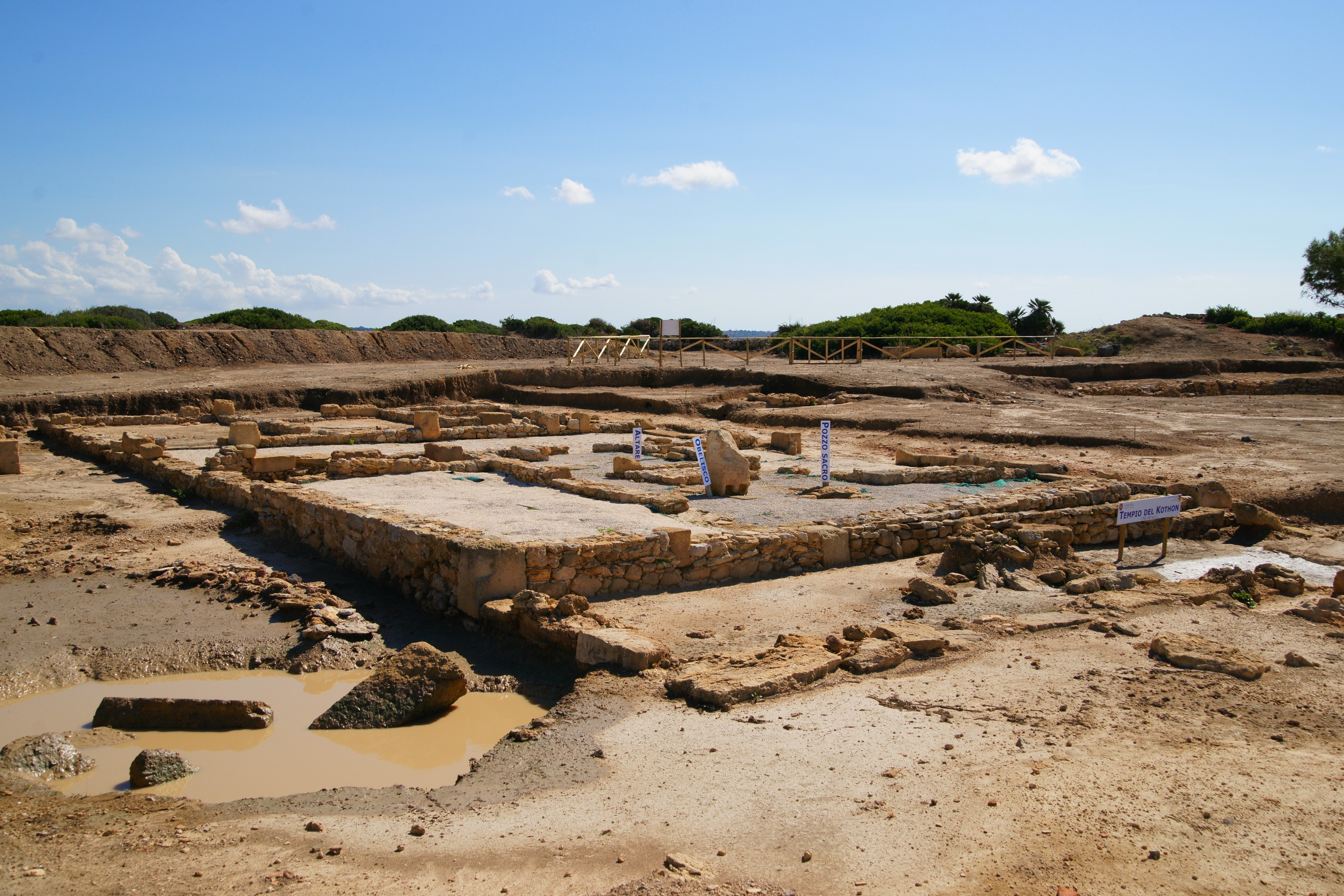 Mozia: Baal - Tempel beim Kothon